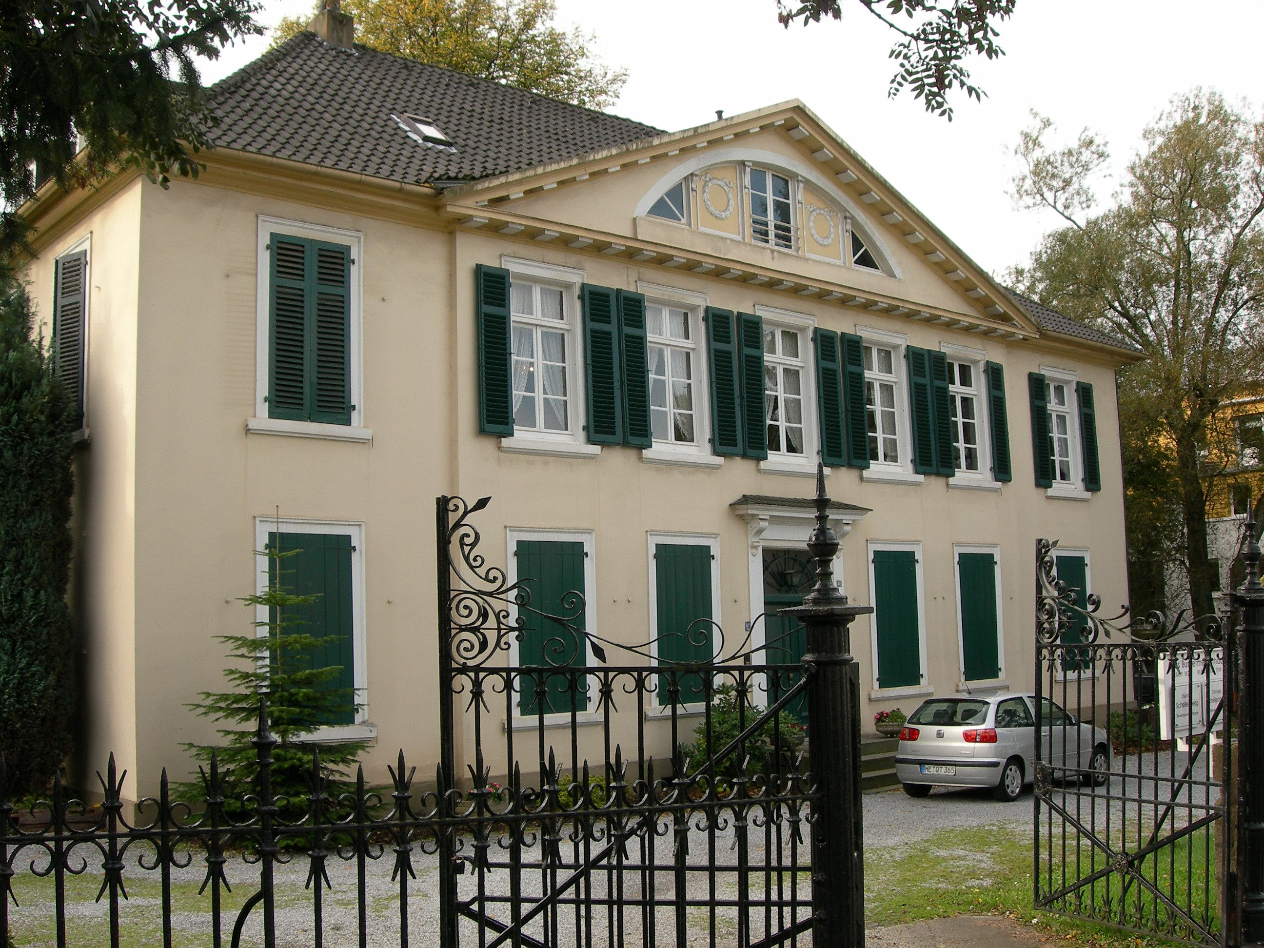 Bürgermeisterhaus, Velbert, Sitz v. Dr. Tweer 1926-1945